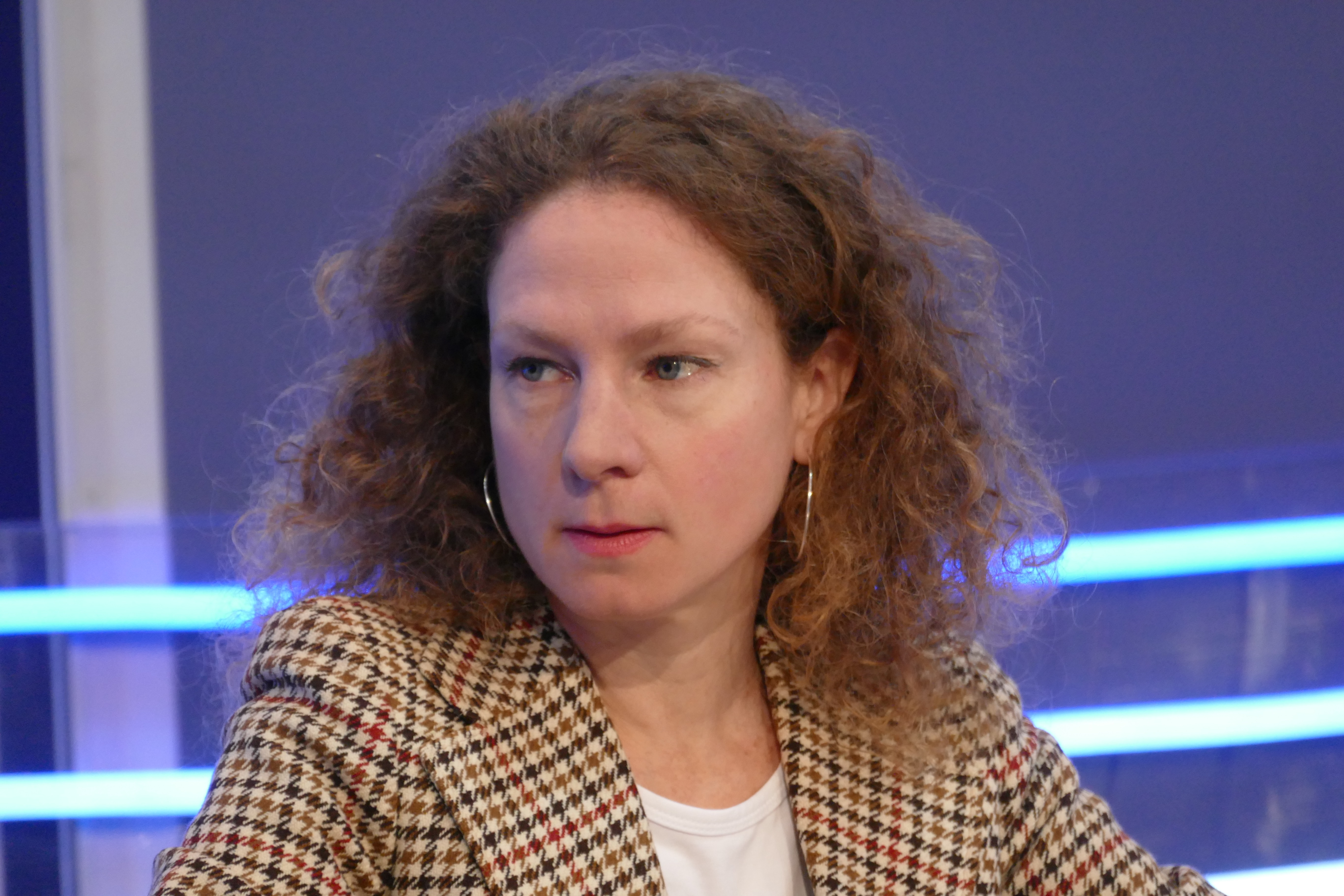 Marie Rotkopf spricht auf der Leipziger Buchmesse 2017 über ihr "Antiromantisches Manifest "